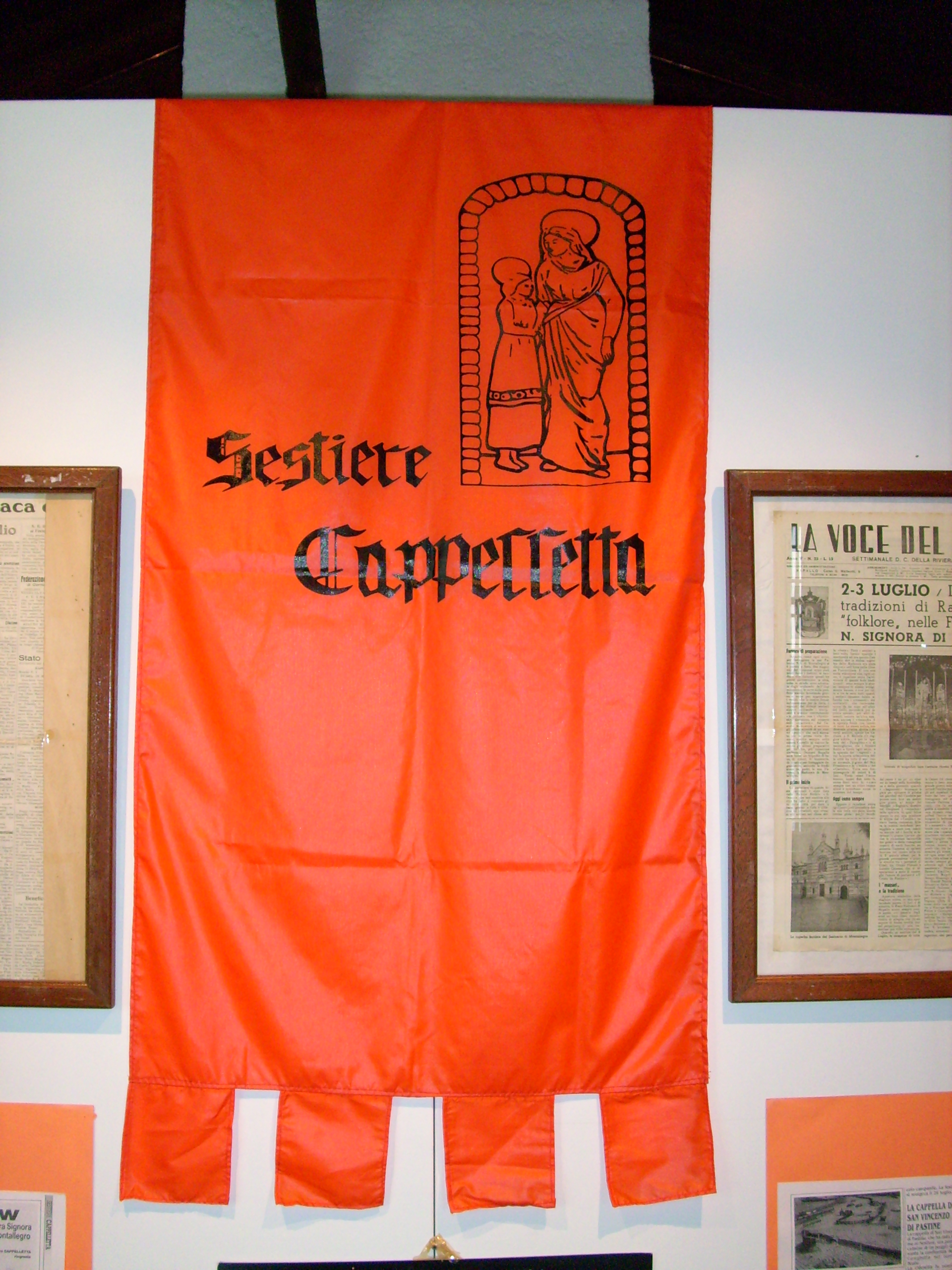 Bandiera del Sestiere Seglio di Rapallo, Liguria, Italia